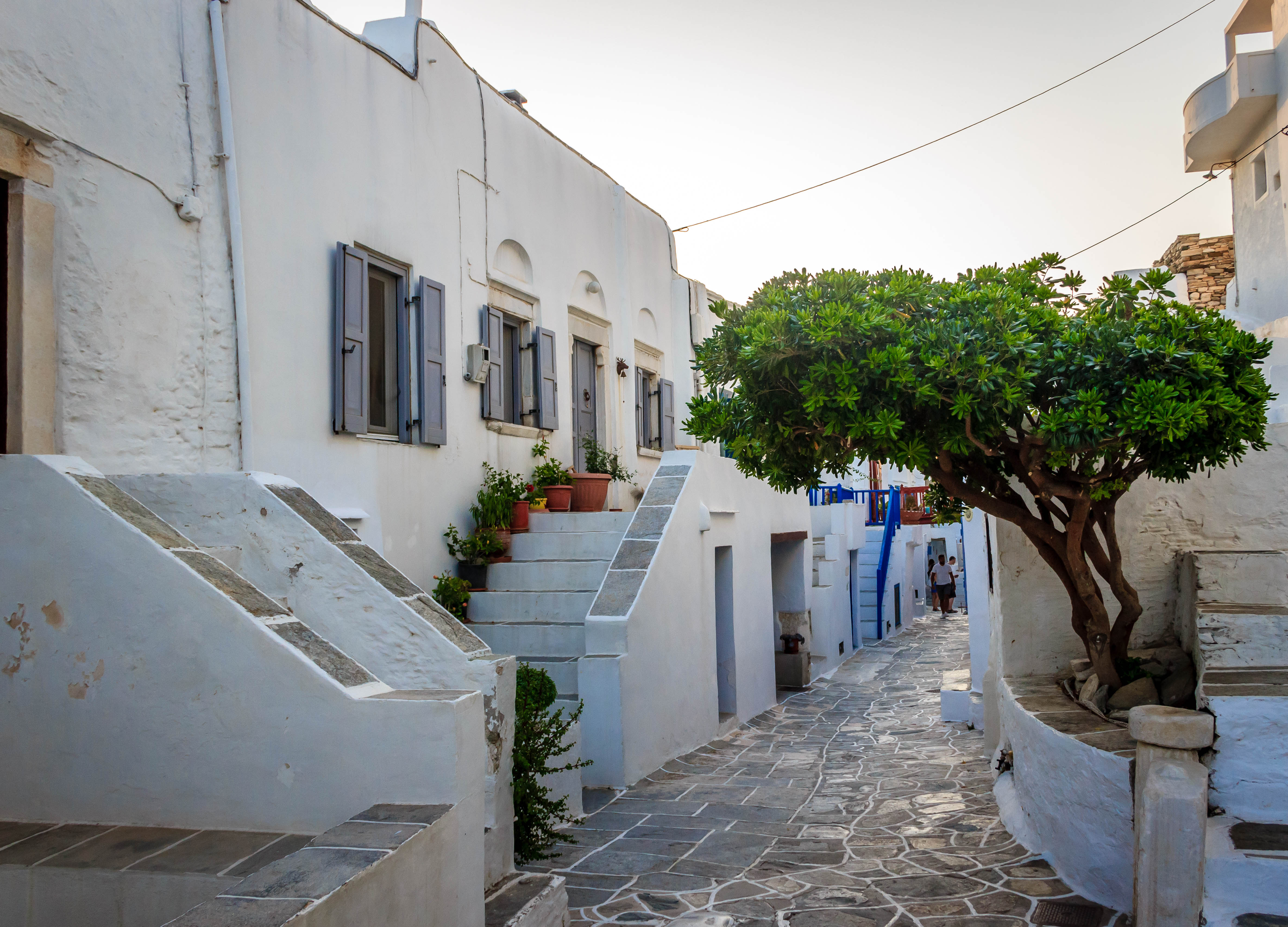 Κάστρο Σίφνου«Κάστρο Σίφνου»